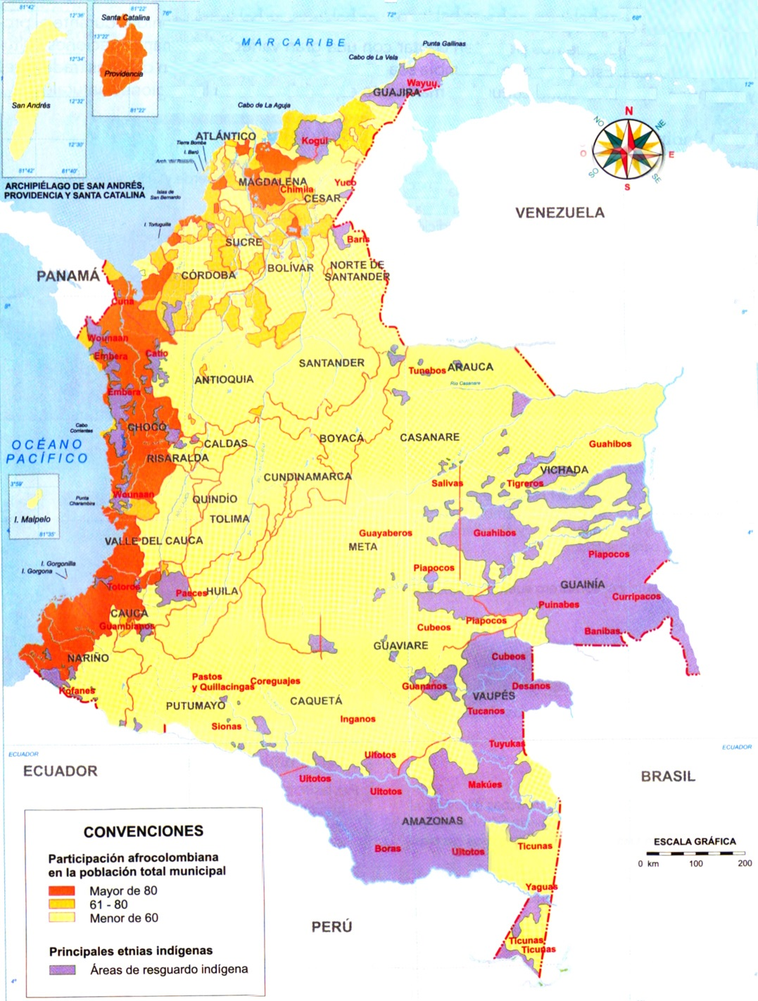 mapa de ubicacion de los indigenas